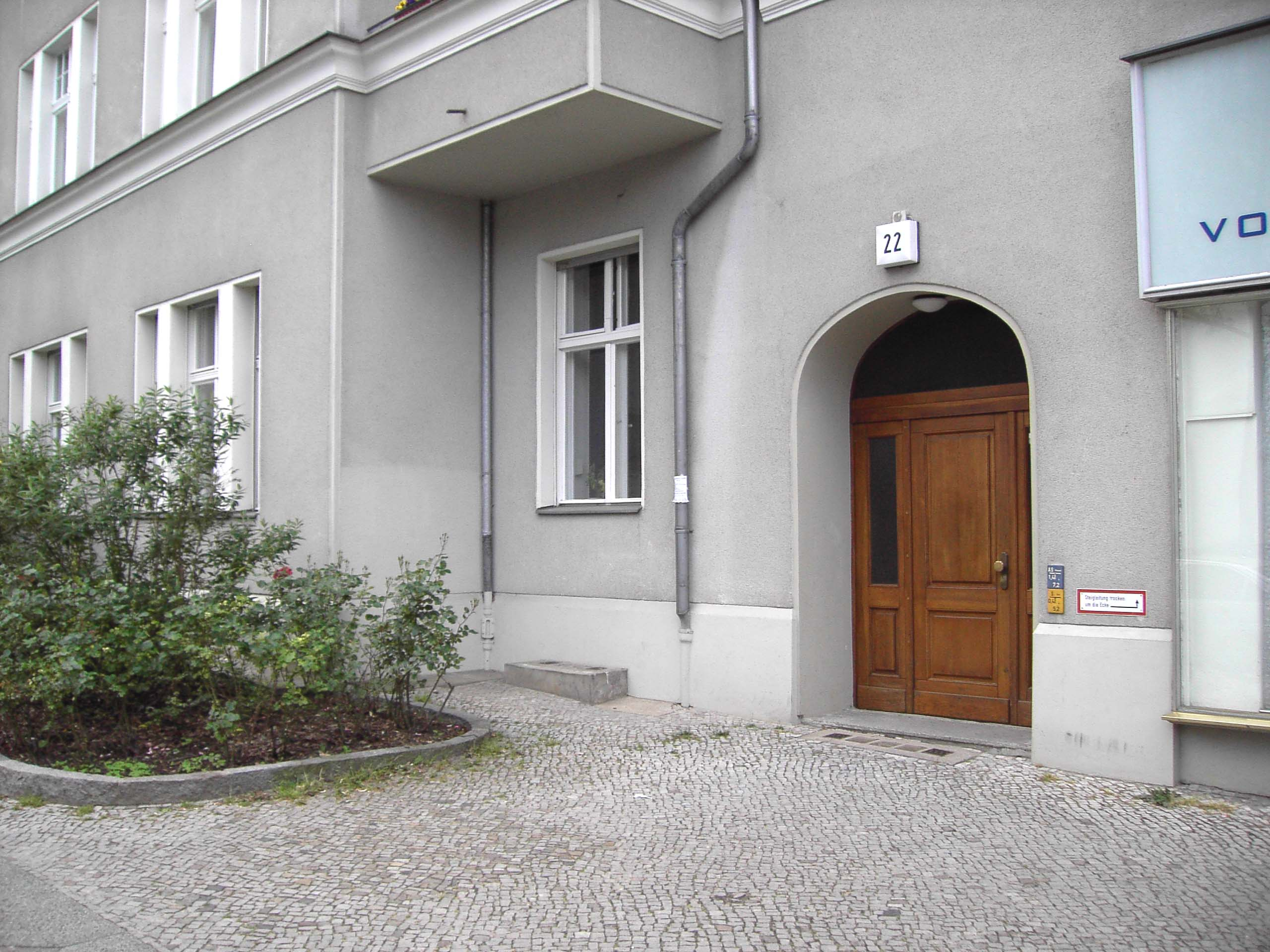 Wohnhaus Inge Deutschkrons 1941-1943, Bamberger Str. 22, Berlin-Schöneberg